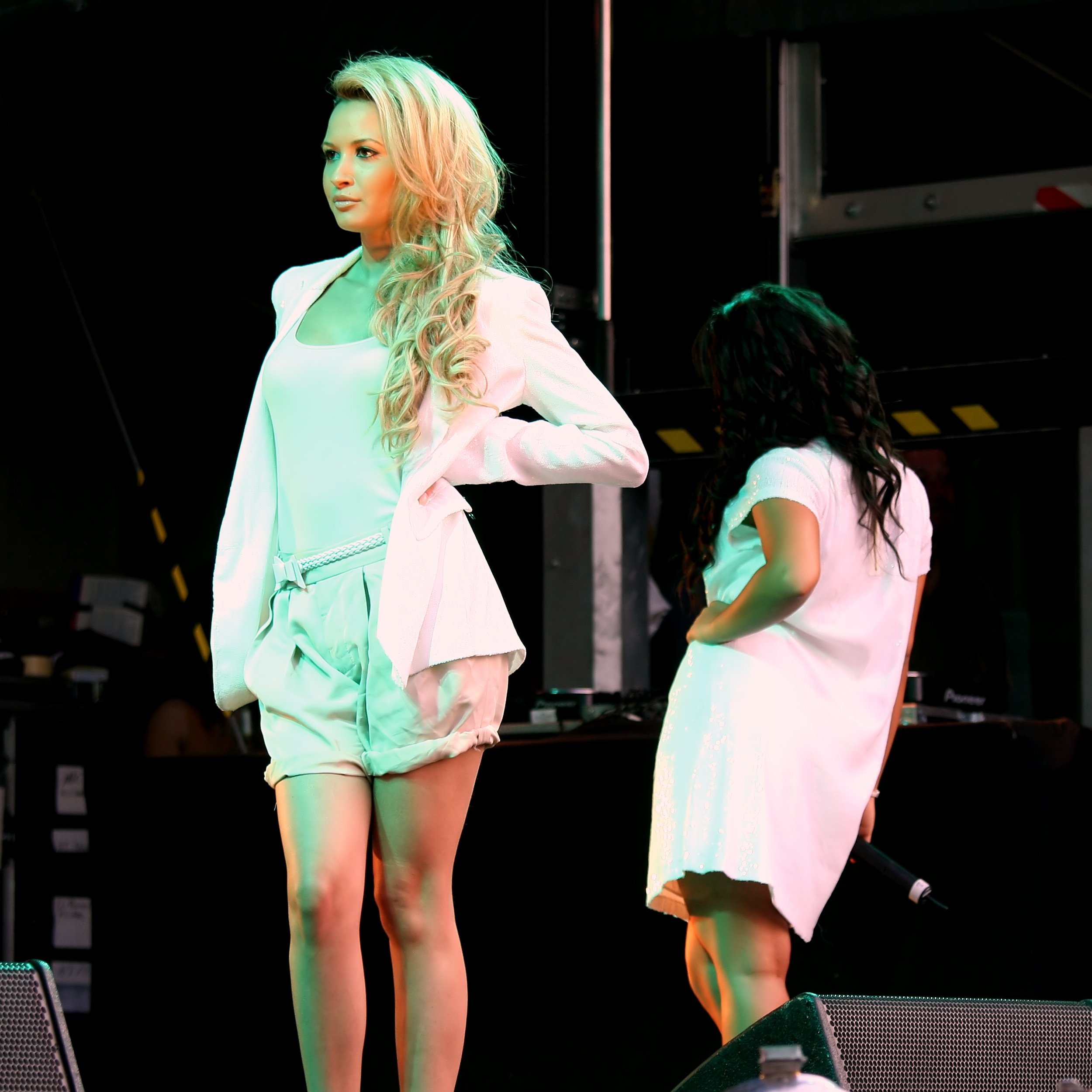 Die Gruppe „Monrose“ - Mandy Capristo - auf der Hauptbühne auf dem Heumarkt, Köln. Bühnenprogramm zum CSD-Straßenfest/ColognePride 2009.